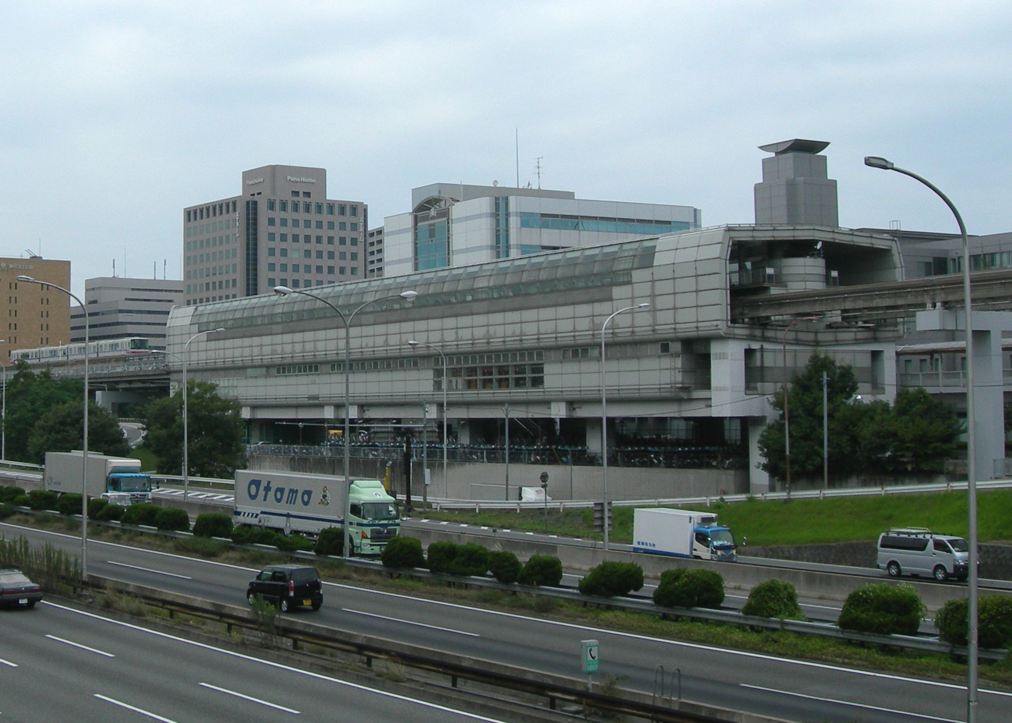 大阪モノレール千里中央駅